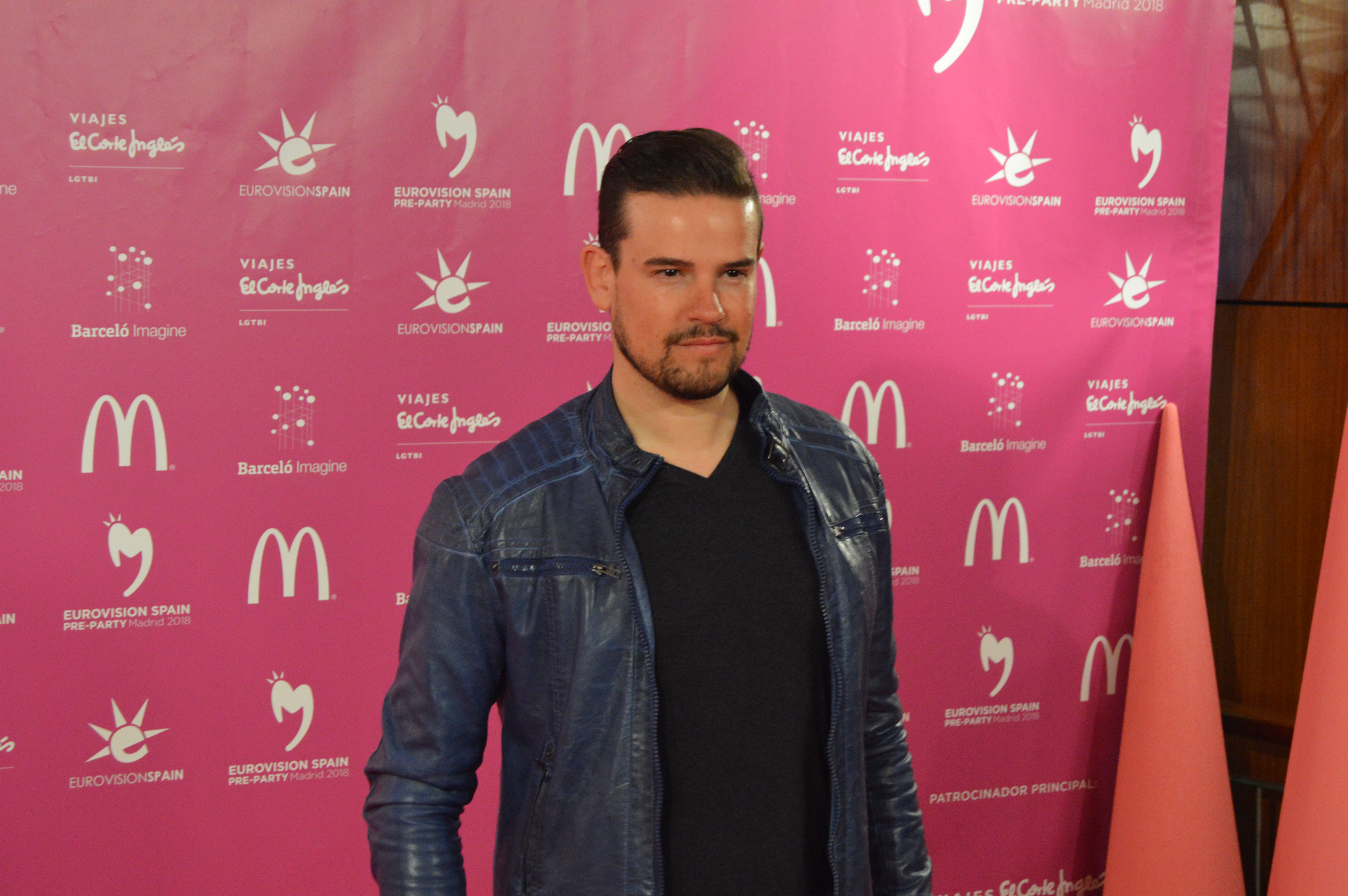 Raúl Fuentes posa ante los medios en la Eurovision Spain PreParty en Madrid (Abril 2018)